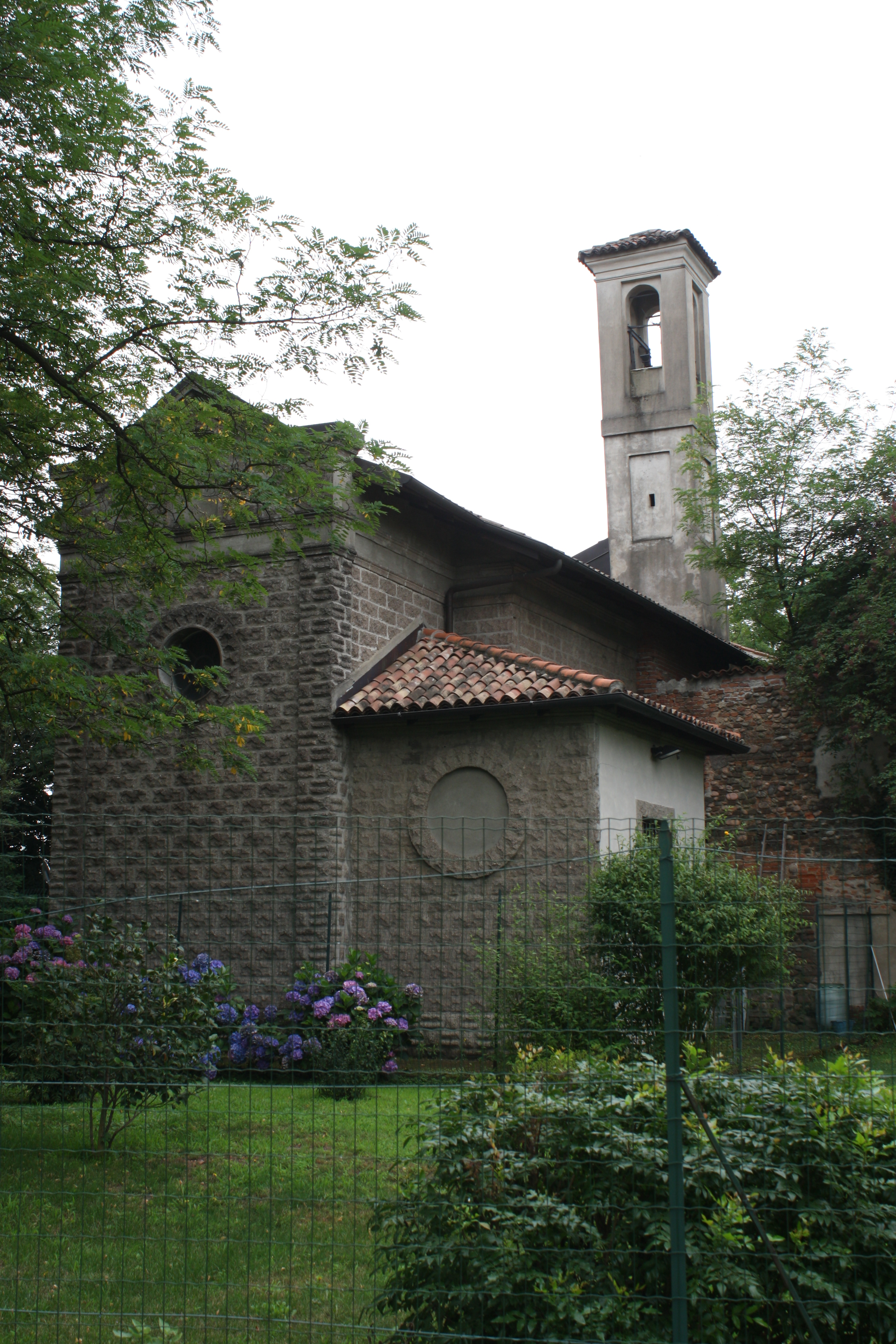 La chiesa di San Bernardino presso la Cascina dei Poveri a Busto Arsizio.